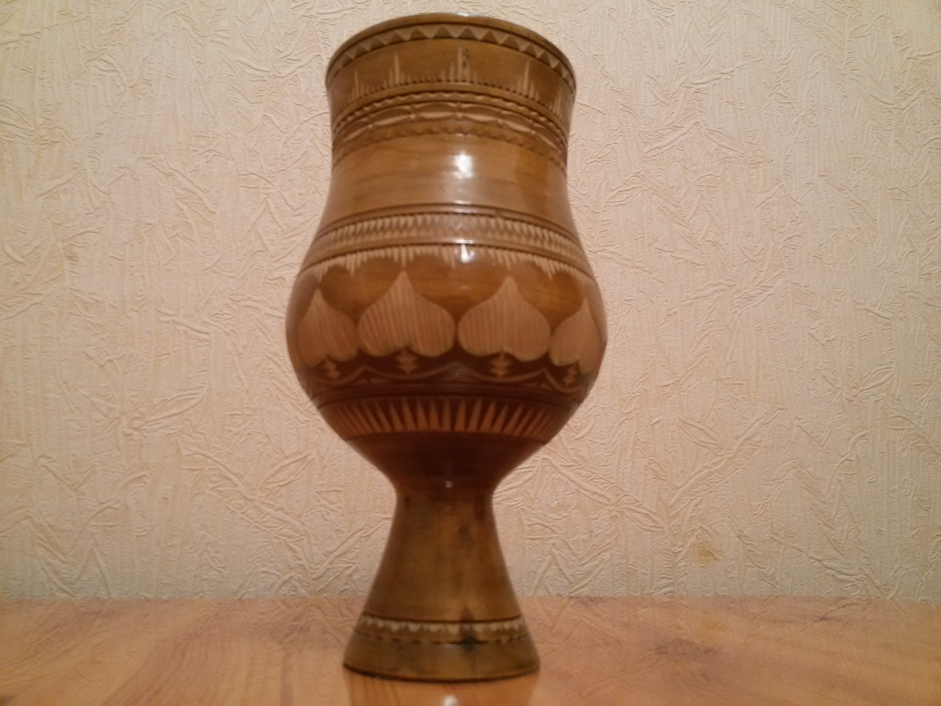 Чорон